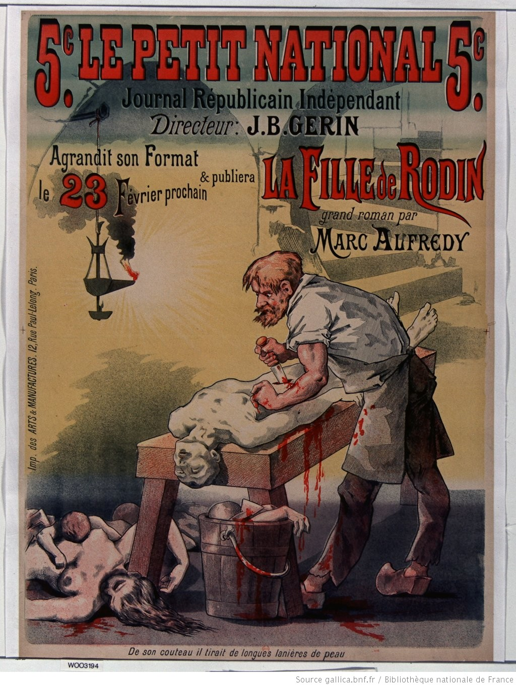 La Fille de Rodin, Affiche de 1888 annonçant la sortie d'un roman policier. Auguste Rodin caricaturé en tueurs en série de femmes et d'enfants.